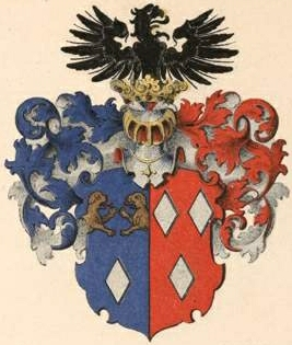 Berens von Rautenfeldi suguvõsa aadlivapp